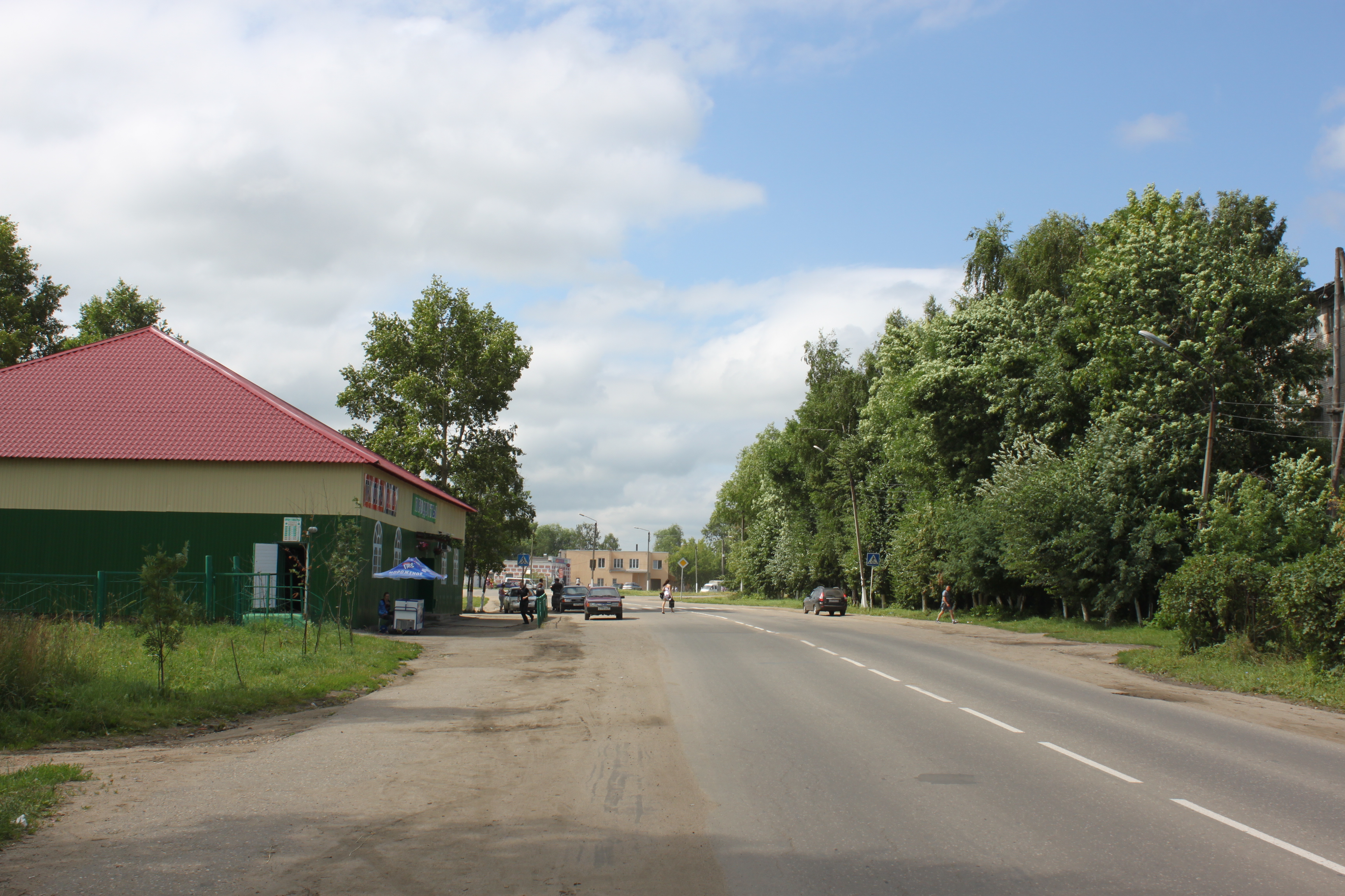 Въезд в Приволжск со стороны Плеса